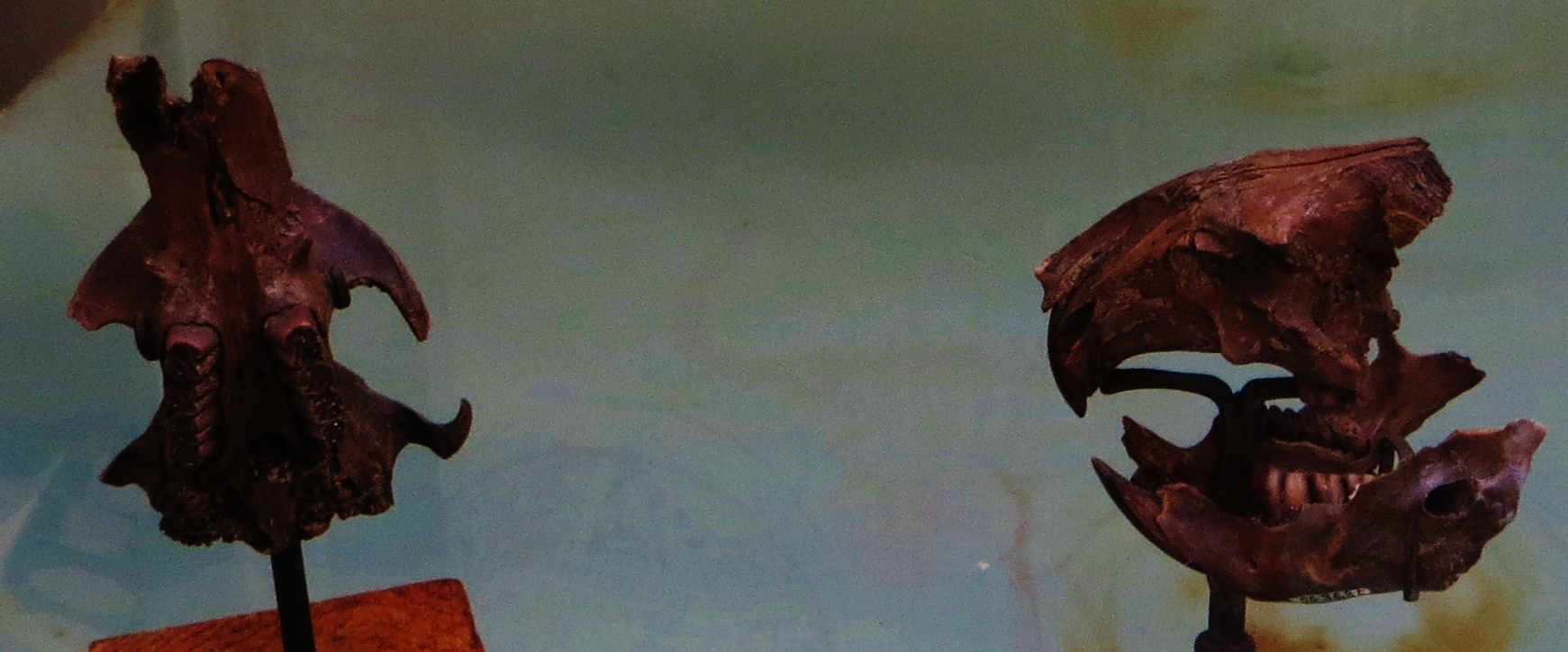 Fossil of Steneofiber, an extinct mammal - Took the photo at Musee d'Histoire Naturelle, Paris